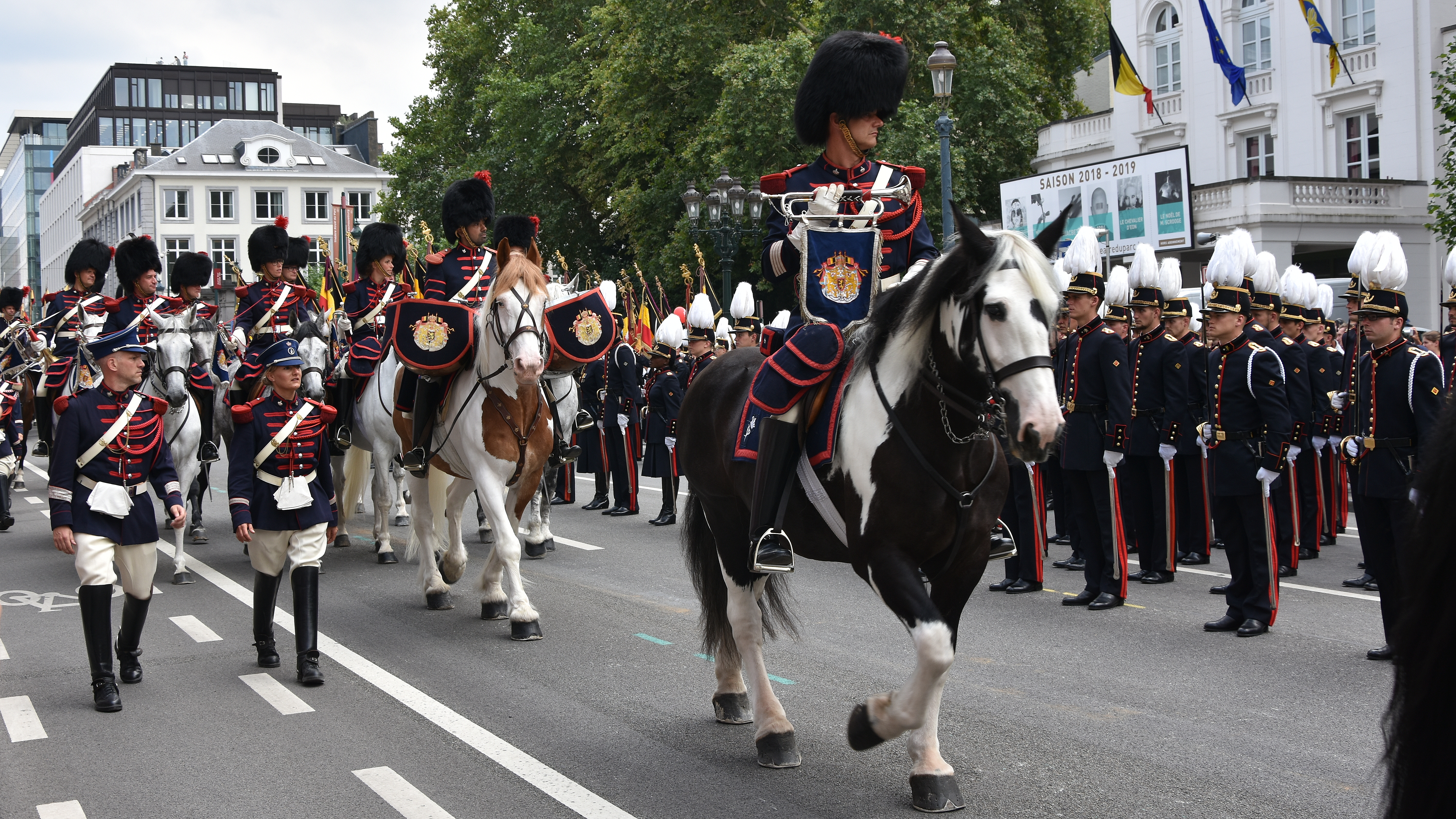 Koninklijke escorte - nationaal défile 2018 This photo of immaterial heritage has been taken in the Brussels Capital Region